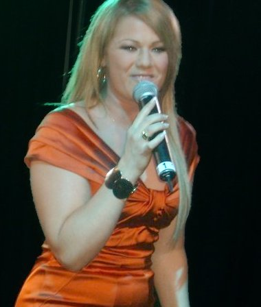 Maria Haukaas Storeng. Photo taken at Scala nightclub, London.